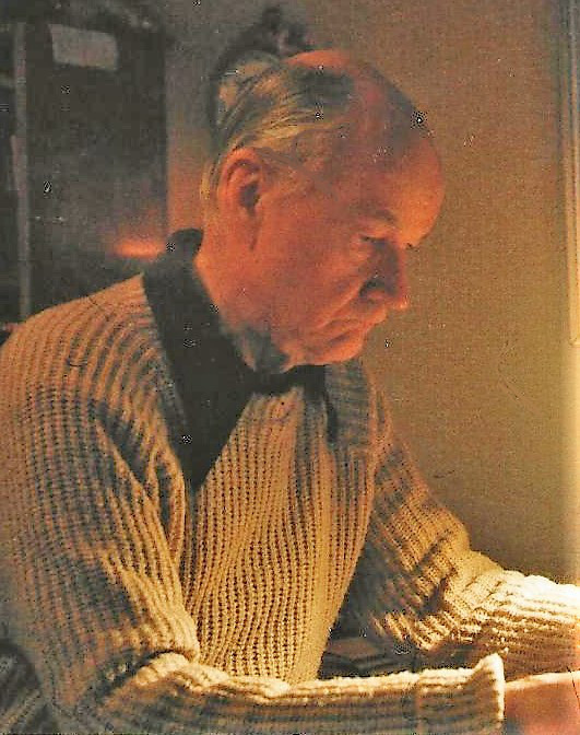 Eero Permi kotonaan